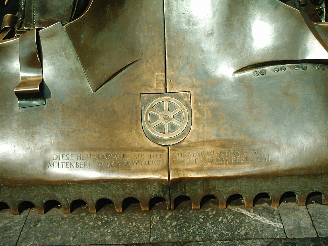 Miltenberger Heune-Saeule in Mainz Hinweisplatte Quelle: Privat Lizenz: GNU FDL